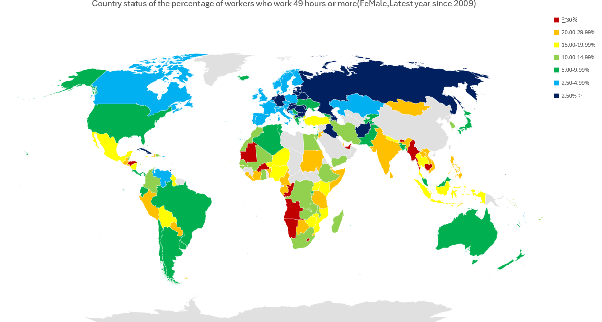 49時間以上女性労働者の割合の国別状況。パートタイムや自営業も含む。